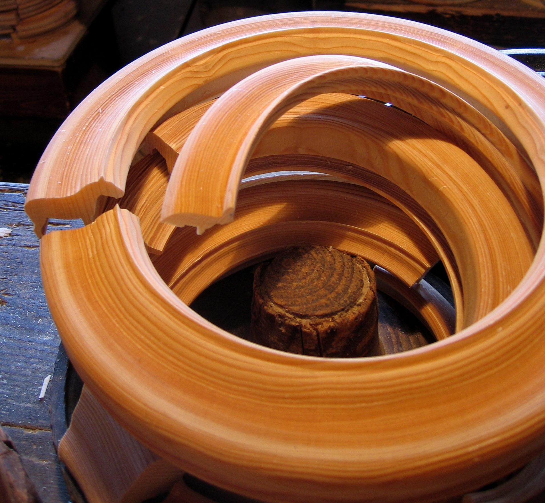 Erzgebirgisches Freilichtmuseum Seiffen, Juli 2009